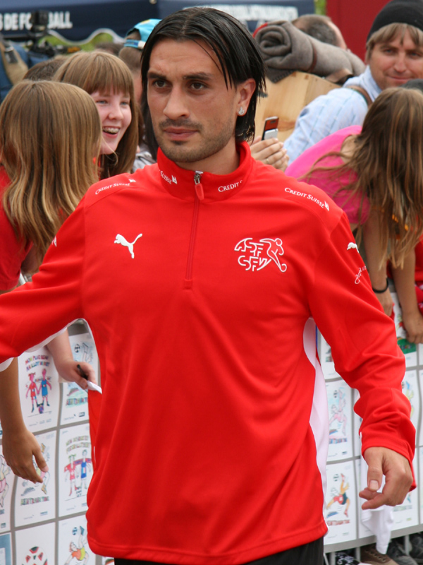 Hakan Yakin im Trainingslager der Schweizer Fussballnationalmannschaft vor der Euro 2008